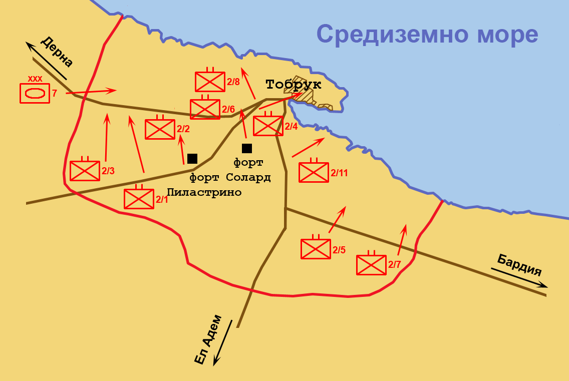 Атаката срещу Тобрук. Фаза първа, част втора.